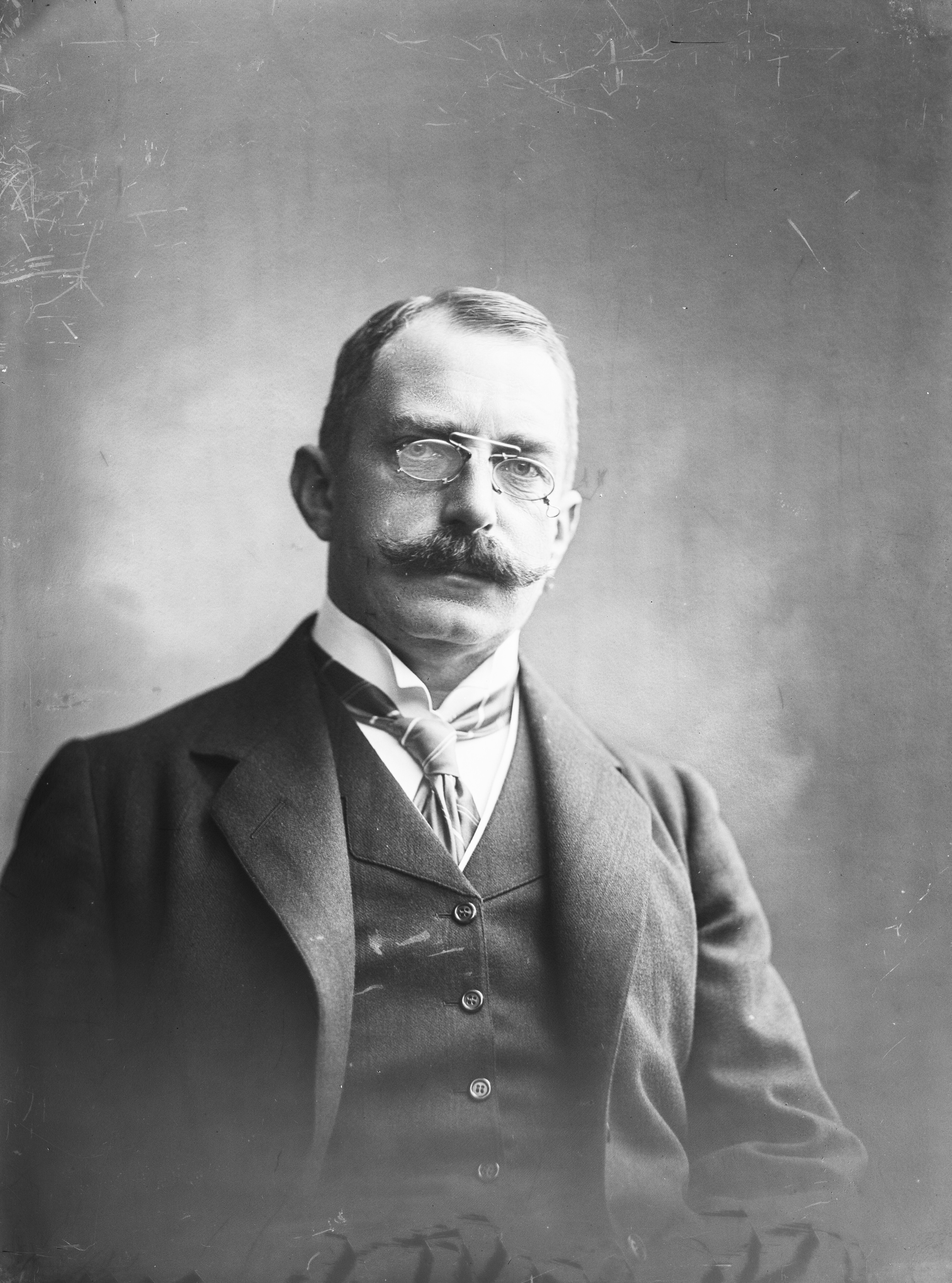 Carl William Ahlefeldt-Laurvig (født 1860 på Tranekær Slot, Langeland, død 1923 i København), dansk politiker og diplomat. Han var gesandt i Wien 1897-1908 og blev udenrigsminister i Ministeriet Neergaard I 1908-09, i Ministeriet Holstein-Ledreborg og igen i Ministeriet Berntsen 1910-13.